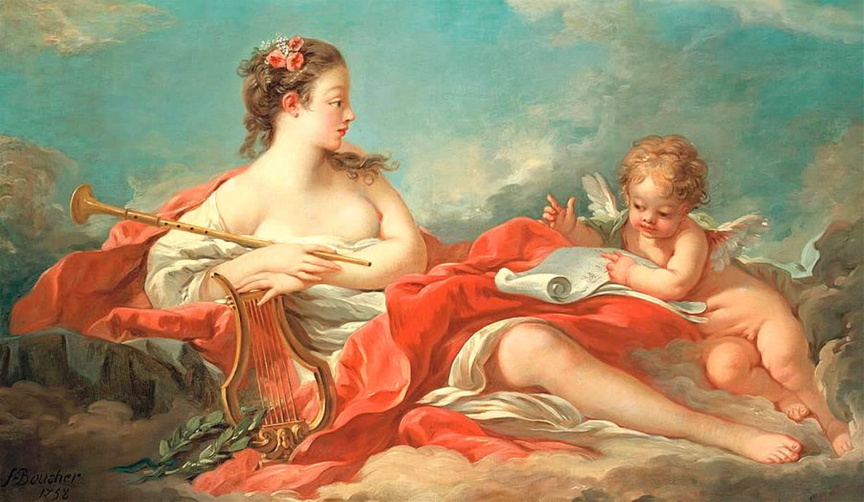 ? × ? cm